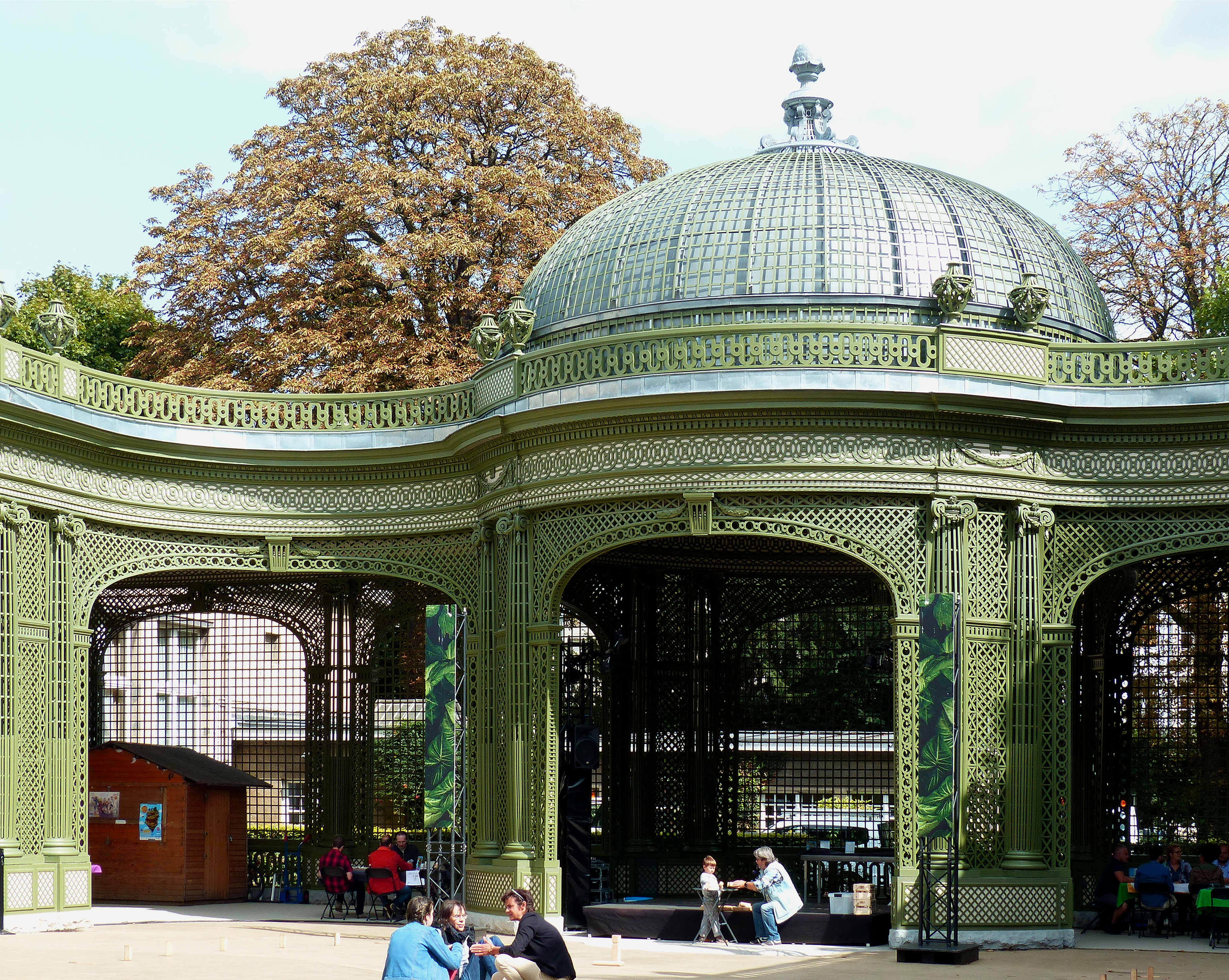 Vauxhall salle de spectacle située dans le Parc De Bruxlles